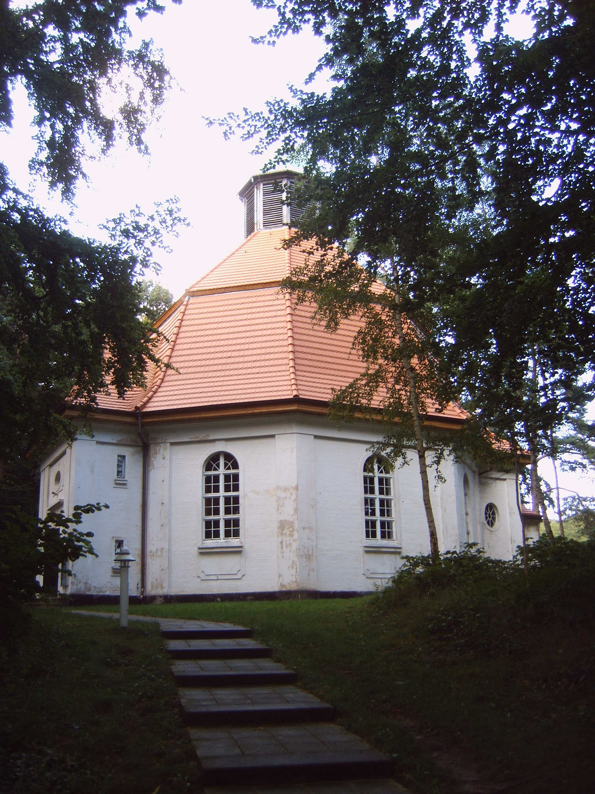 Gnadenkirche Sellin auf Rügen, Deutschland